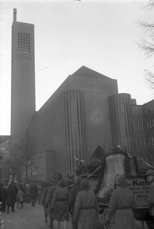 Feierliche Glockeneinholung für die ev. Hohenzollern-Kirche in Wilmersdorf. Die Glocken werden unter Geleit von Jungfrauen zur Hohenzollernkirche (im Hintergrund) gebracht.